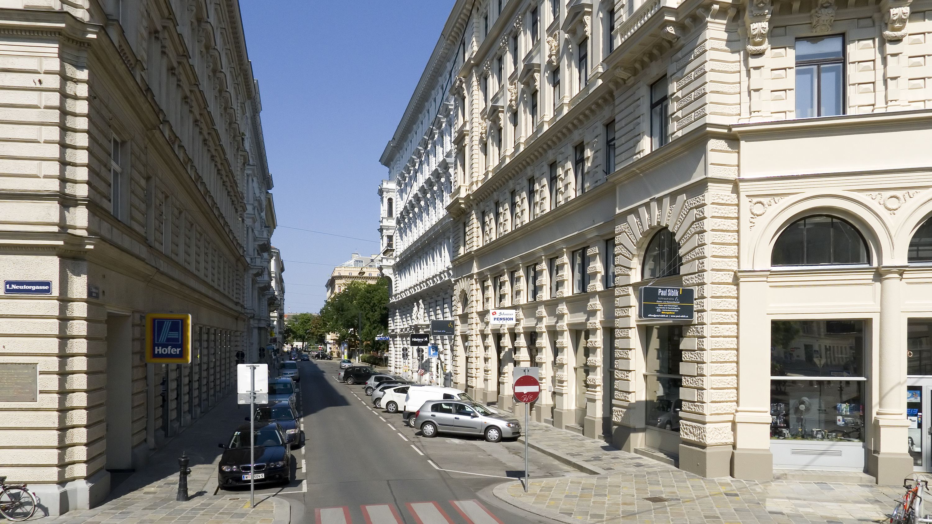 Heinrichsgasse in Wien 1 bei der Neutorgasse Richtung Nordosten